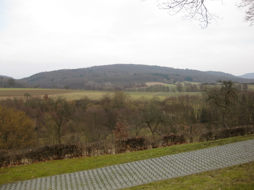 Sommerberg im östlichen Hintertaunus